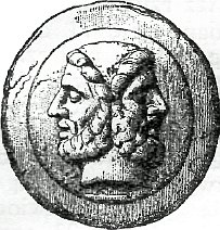 As z wyobrażeniem boga Janusa na awersie